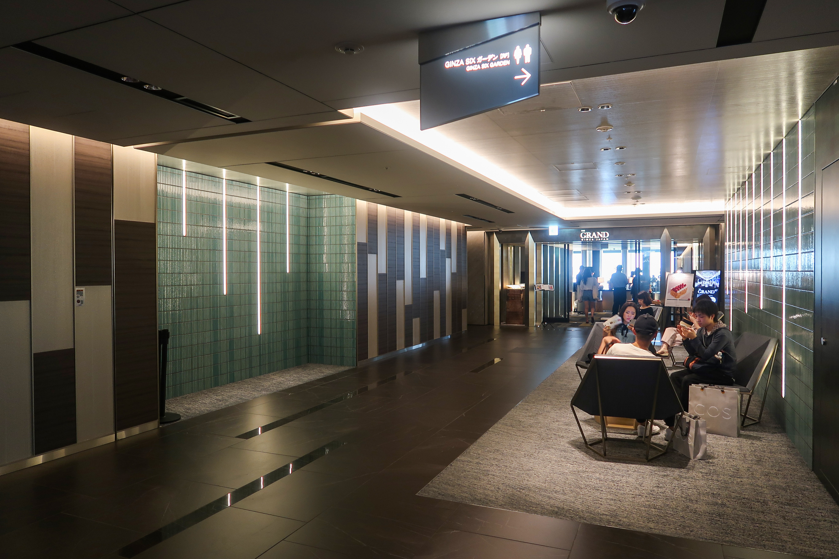 GINZA SIX